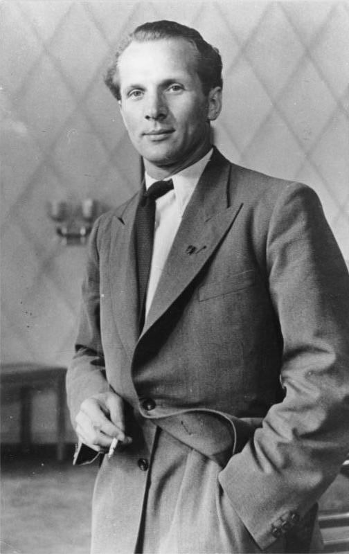 Erich Honecker ADN-Bildarchiv Erich Honecker; geb. 25.8.1912 Vorsitzender der FDJ; Mitglied des Politbüros des ZK der SED Aufnahme vom 9.9.1950 [Erich Honecker stehend (Porträt)] Abgebildete Personen: Honecker, Erich: Staatsratsvorsitzender, Generalsekretär des ZK der SED, DDR (GND 118553399)